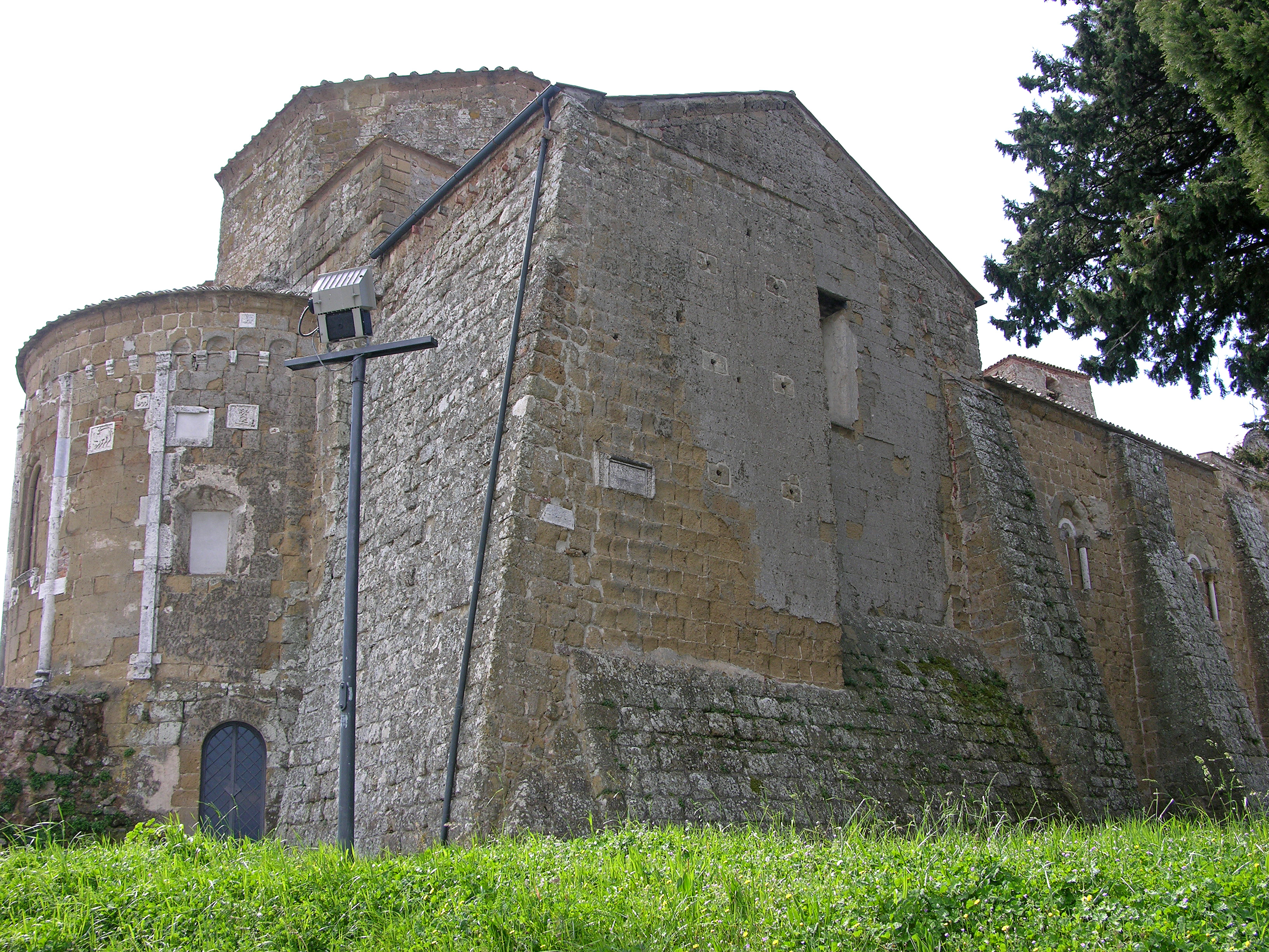 Duomo di Sovana (GR) - Facciata lato sinistro.